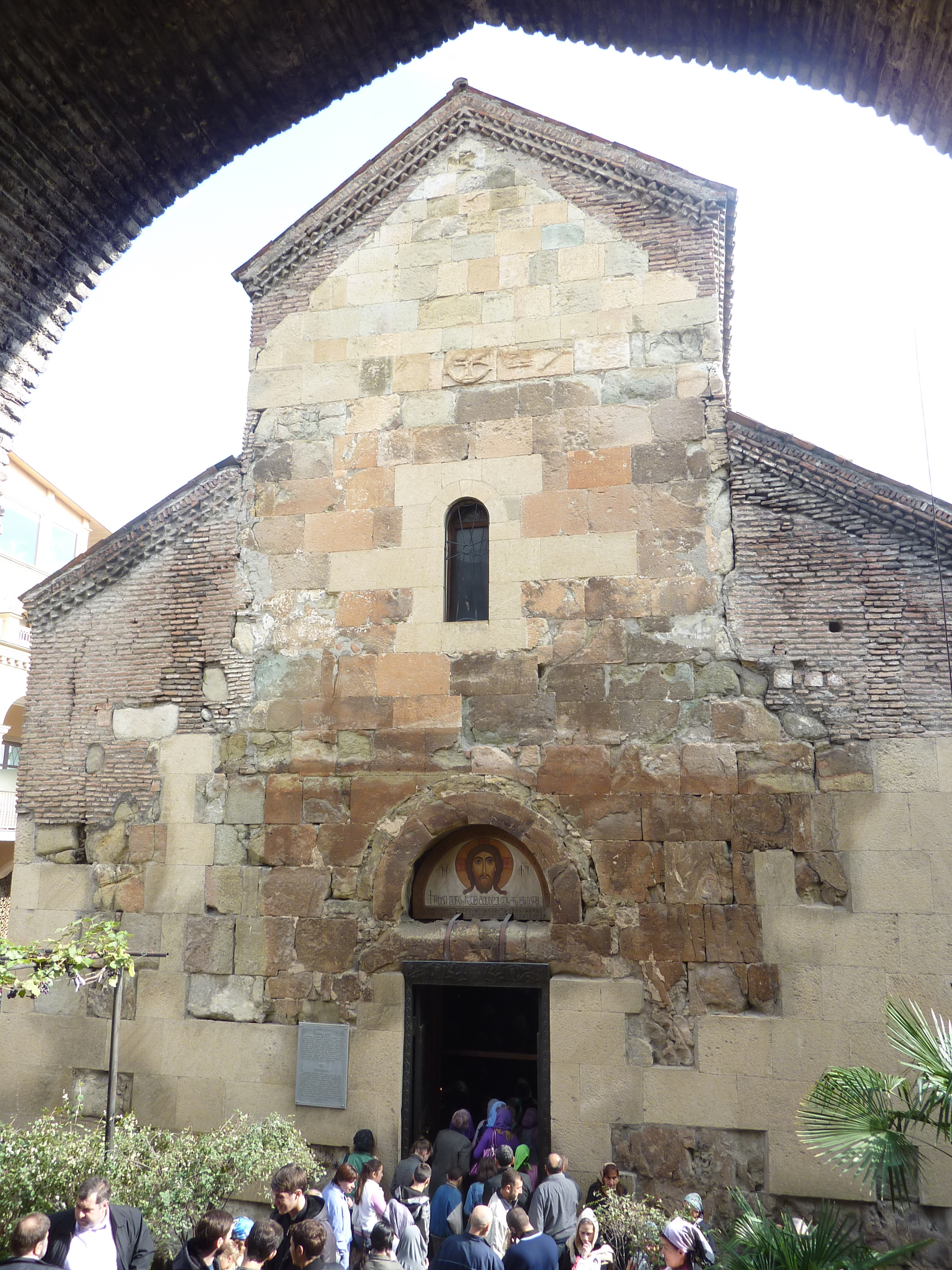 Tbilisi